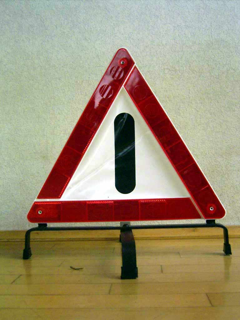 Warndreieck